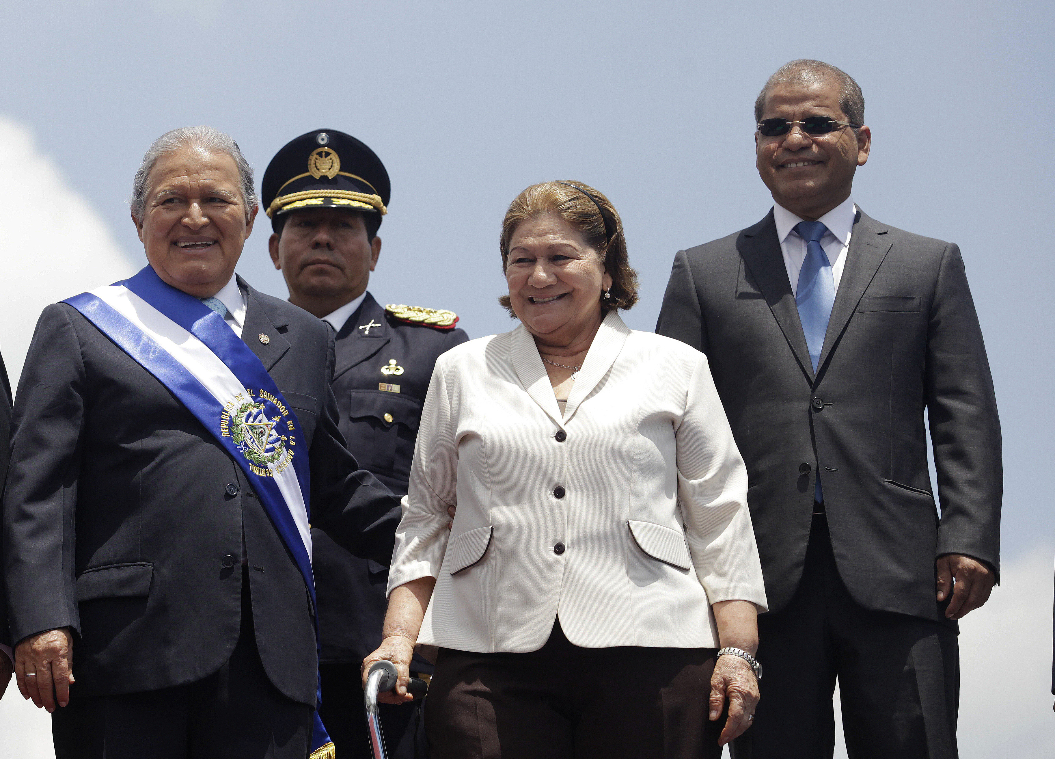 De Izq. a der.: Salvador Sánchez Cerén , Margarita Villalta de Sánchez y Oscar Ortiz.